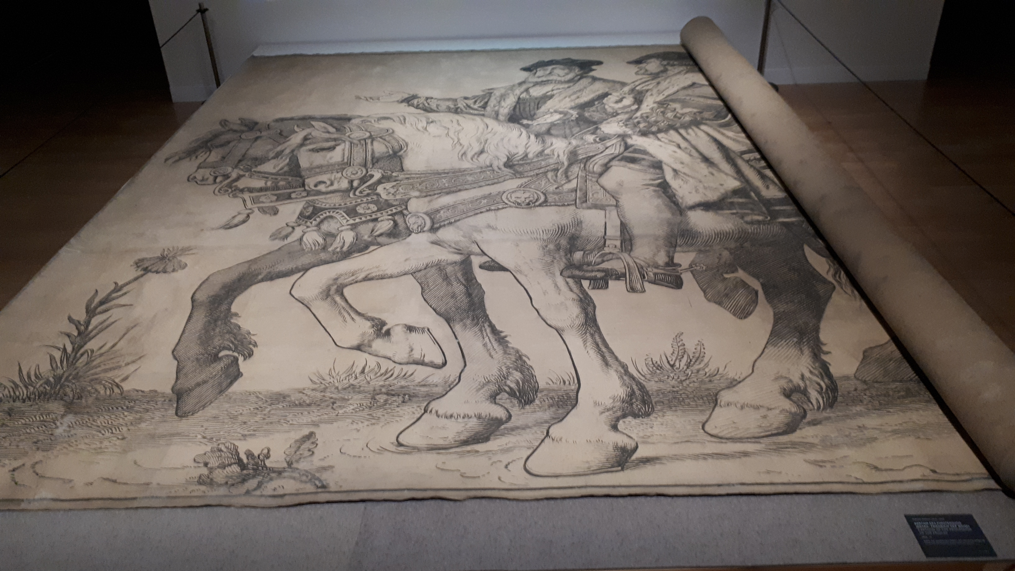 Vorlagenzeichnung für den Dresdner Fürstenzug. Insgesamt 100 Meter lang und 4 Meter hoch, gelagert in 4 Zinkrollen. Gezeichnet vom Dresdner Maler Wilhelm Walther 1868-1872. Kohle auf quadriertem Papier, auf Leinwand aufgelegt.